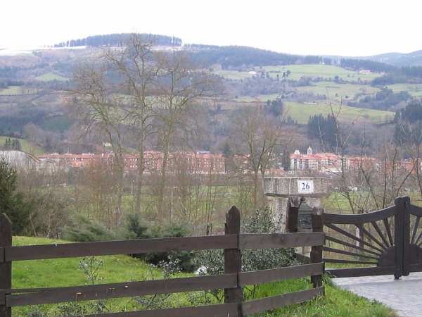 Vista de Zalla